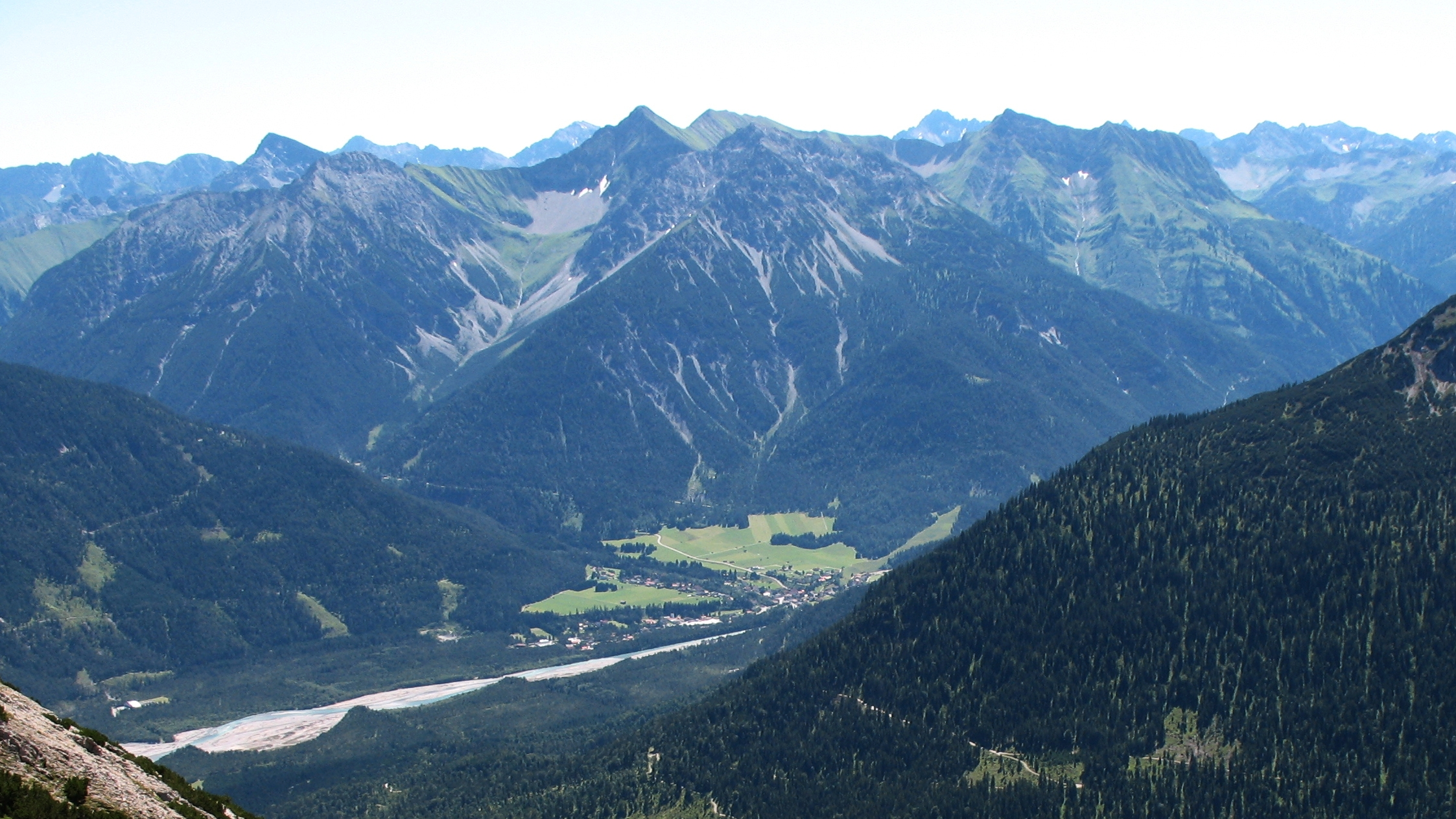 Blick von den Krottenköpfen nach Südosten auf den Kreuzspitzkamm in den Lechtaler Alpen.